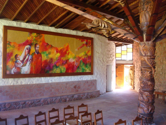 Interior del Santuario Mariano de la Torre